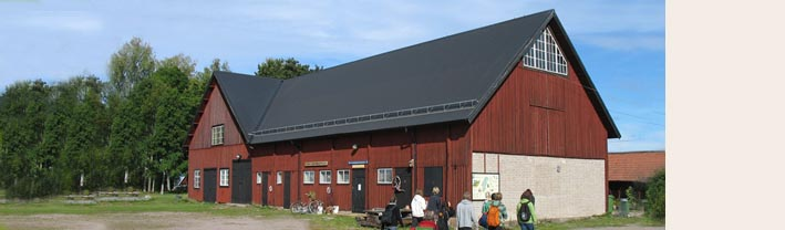 Ladan som Biosfärum Gröna kunskapshuset ligger i tillhörde förut Länsmansgården på Östa. Vid ombyggnationerna som skett har stor hänsyn tagit till det ursprungliga för att visa på och bevara kulturarvet på platsen.